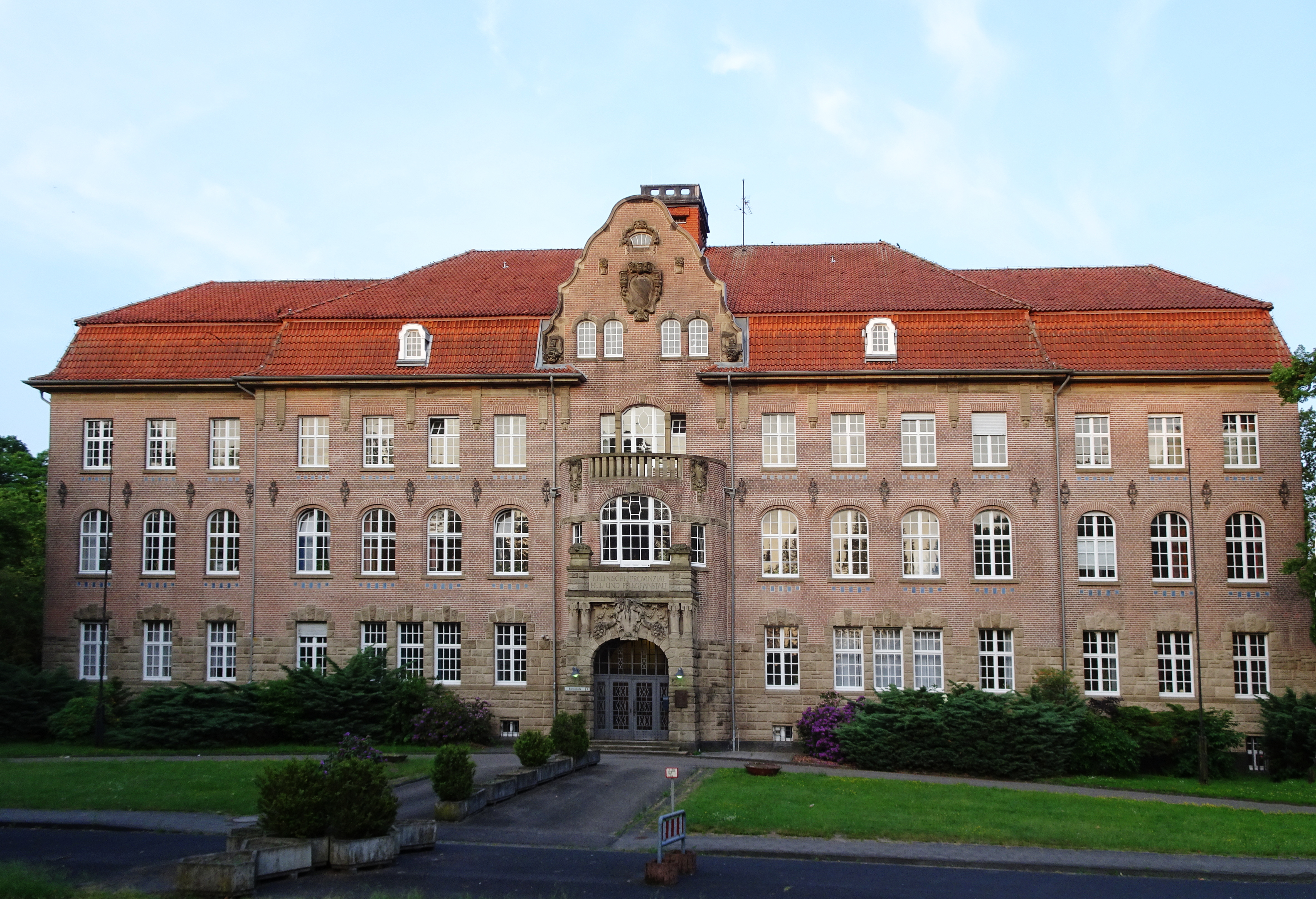 LVR-Klinik Bedburg-Hau, Hauptverwaltungsgebäude, 1912